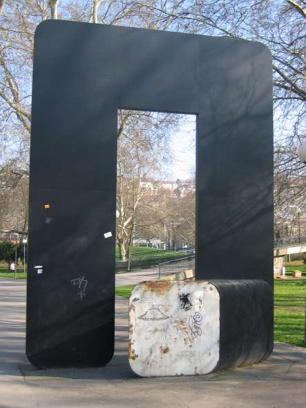 Plastik von Thomas Lenk, Mittlerer Schlossgarten, Stuttgart Fotografiert von Mussklprozz am 2004-03-28. GNU-FDL